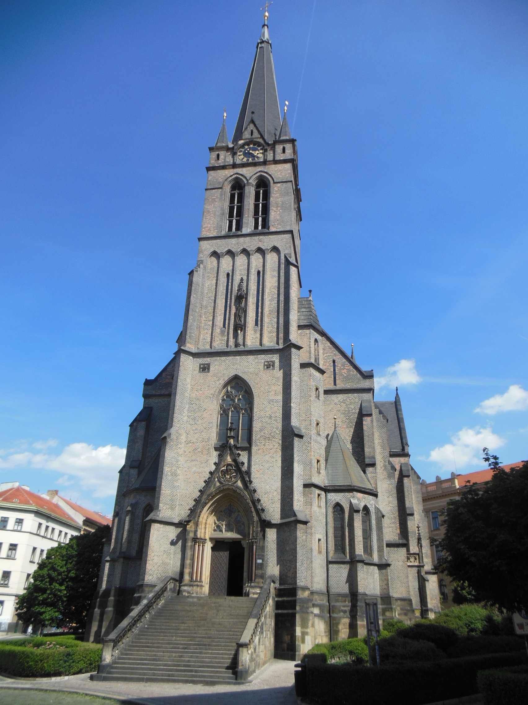 Praha-Žižkov. Sladkovského náměstí, kostel svatého Prokopa, pohled z ulice Vlkova.